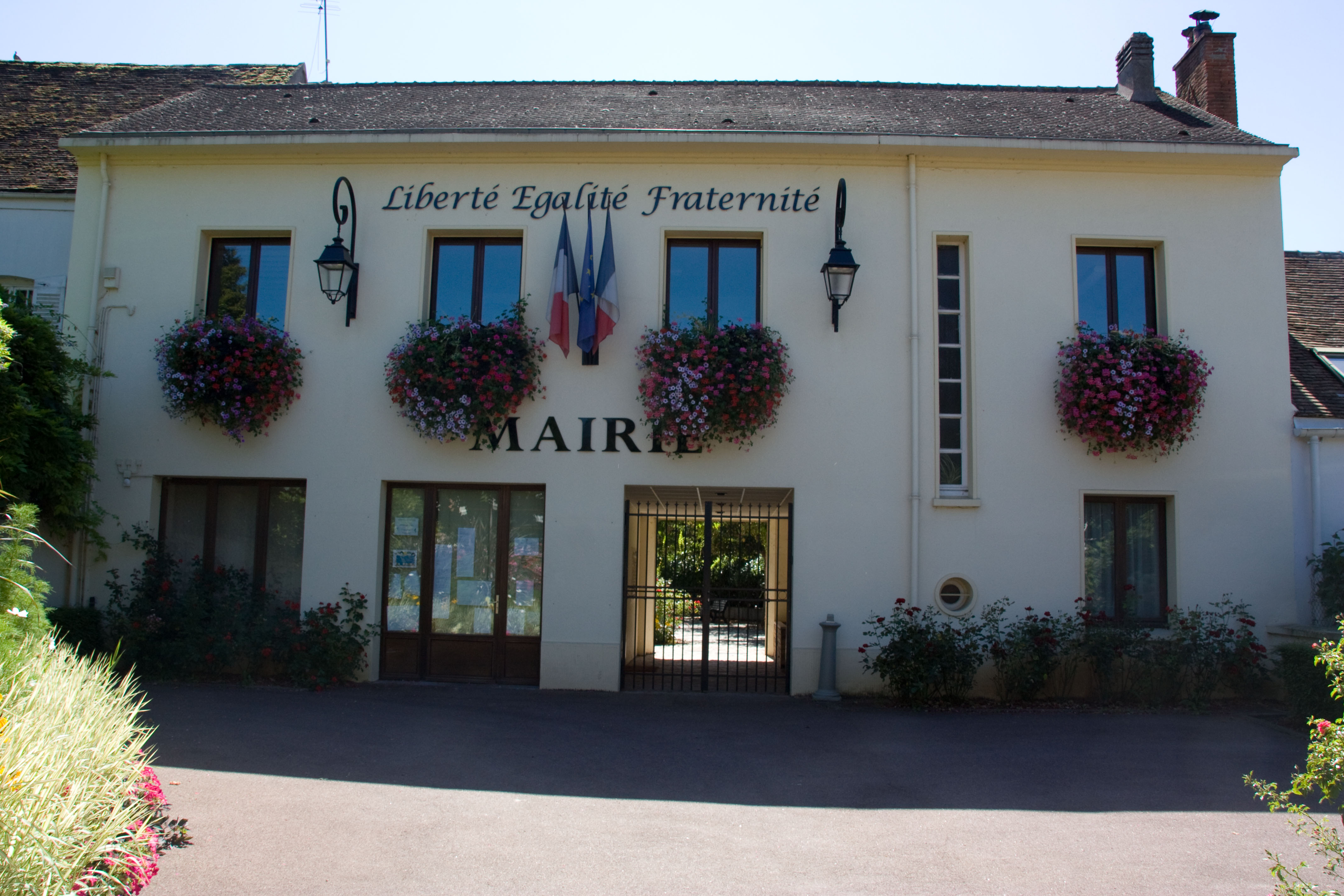 Mairie de Tigery, Tigery, Essonne, France